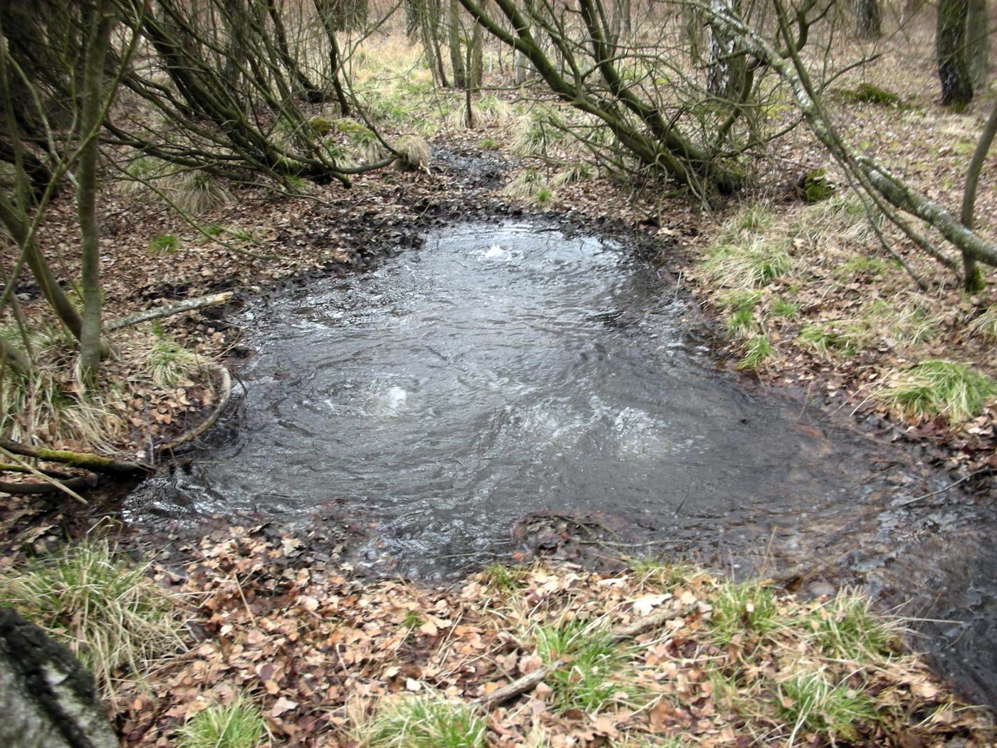 Bublak-Mofette